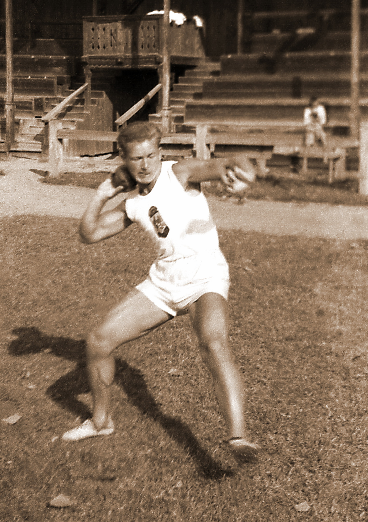 antrenament